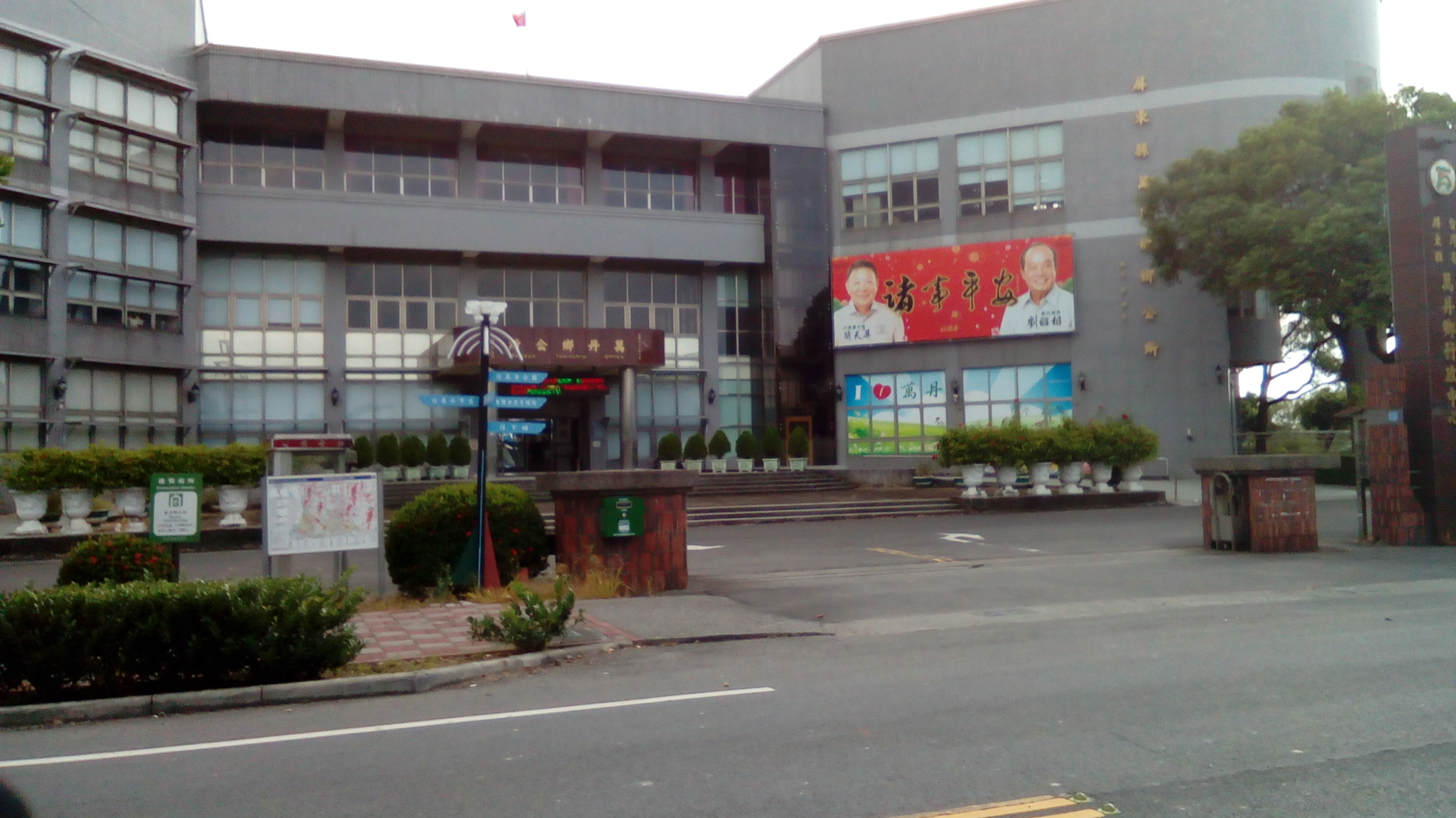 同上 位於和平西路